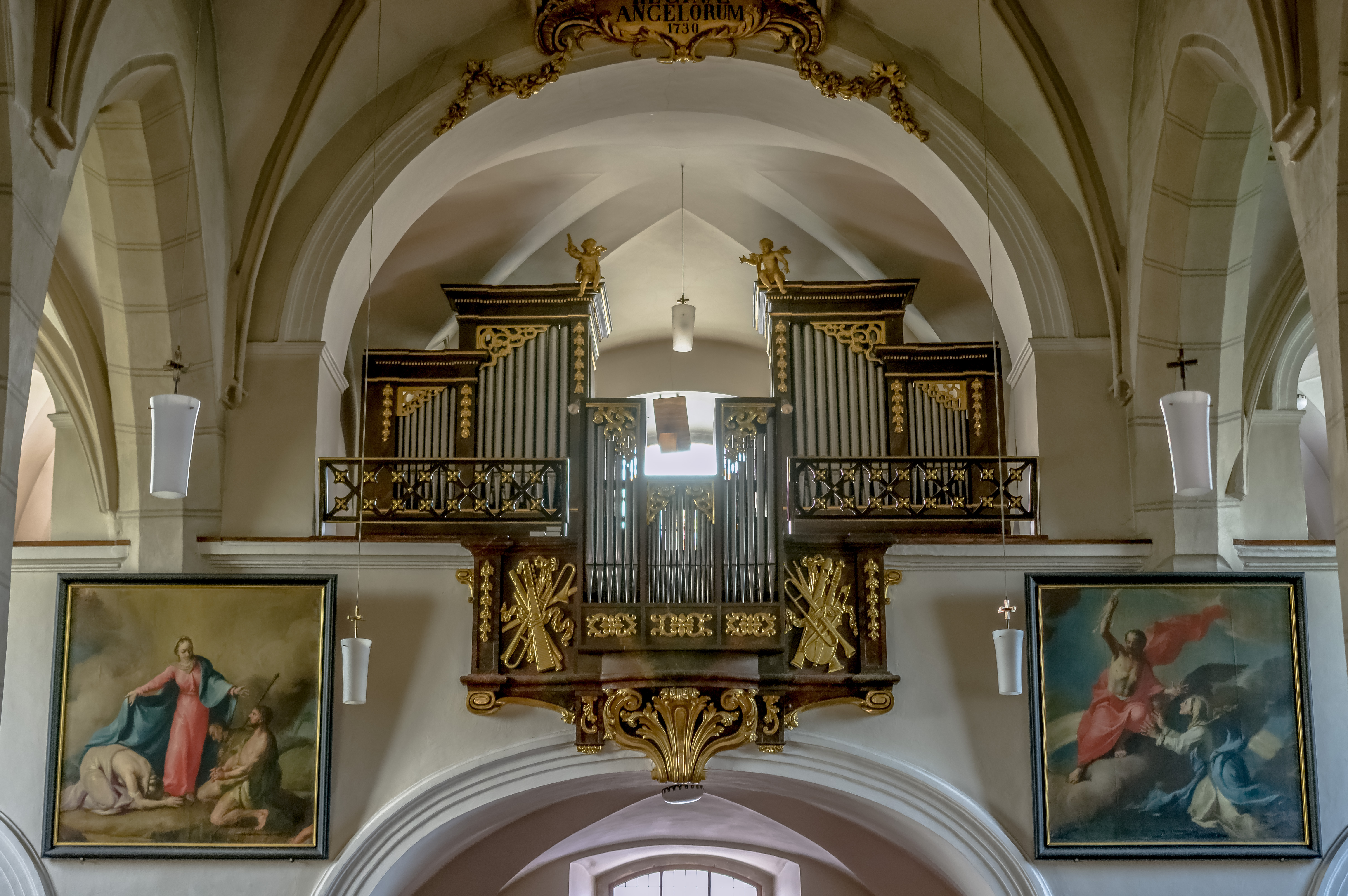 Kath. Pfarrkirche Mariae Himmelfahrt